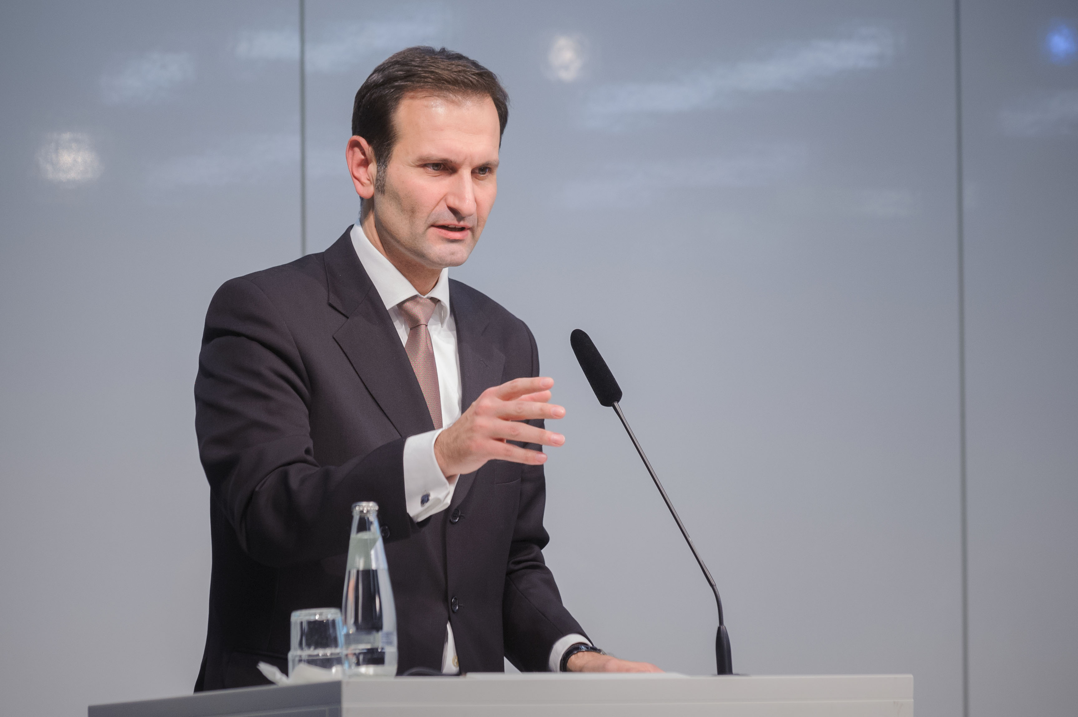 Dr. Miro Kovac (Botschafter der Republik Kroatien) EU-Beitritt Kroatien - Vortrag und Podiumsdiskussion zu den regionalen Auswirkungen des kroatischen EU-Beitritts Foto: Stephan Röhl (